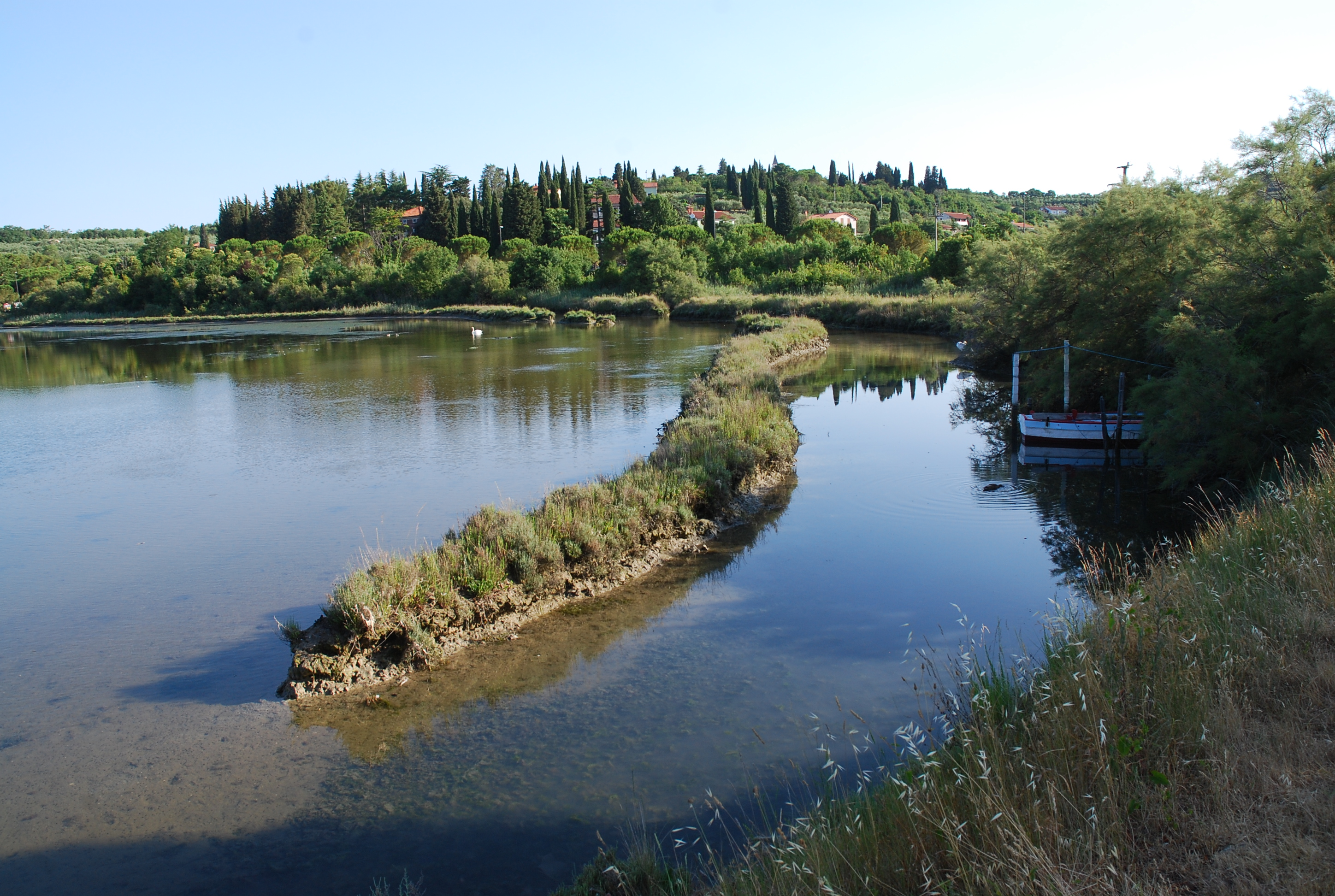 V přírodní rezervaci Strunjan